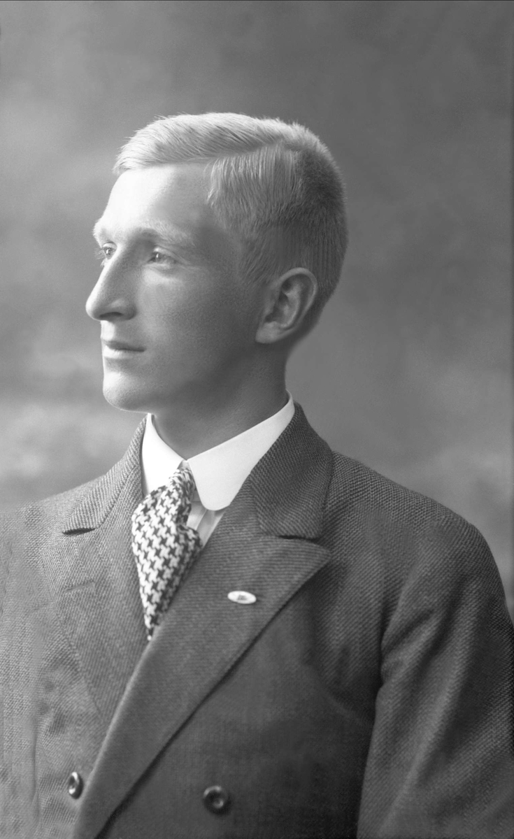 Lars Thalian Backer (1892 - 1930) was a Norwegian architect.